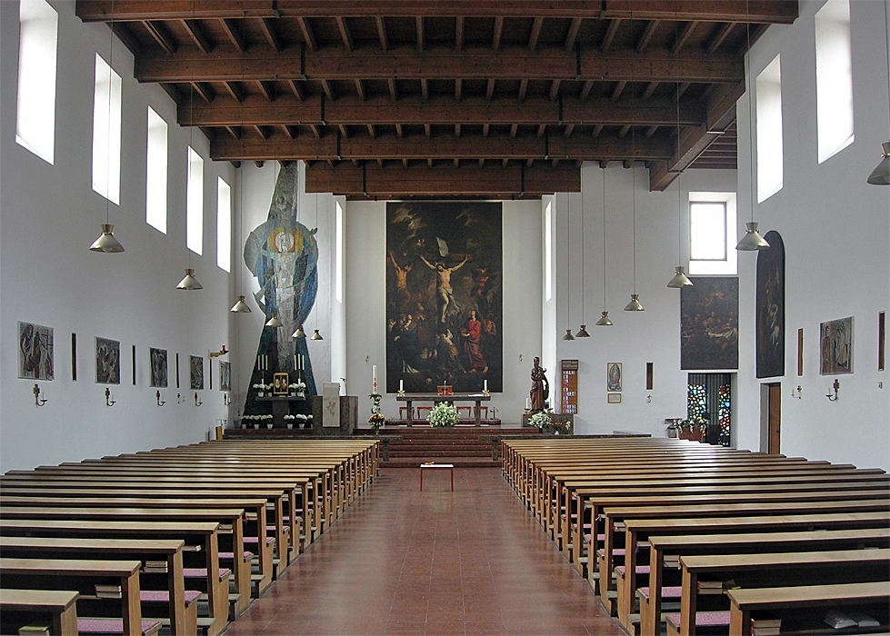 Neulerchenfelder Pfarrkirche (Wien. Innenansicht.